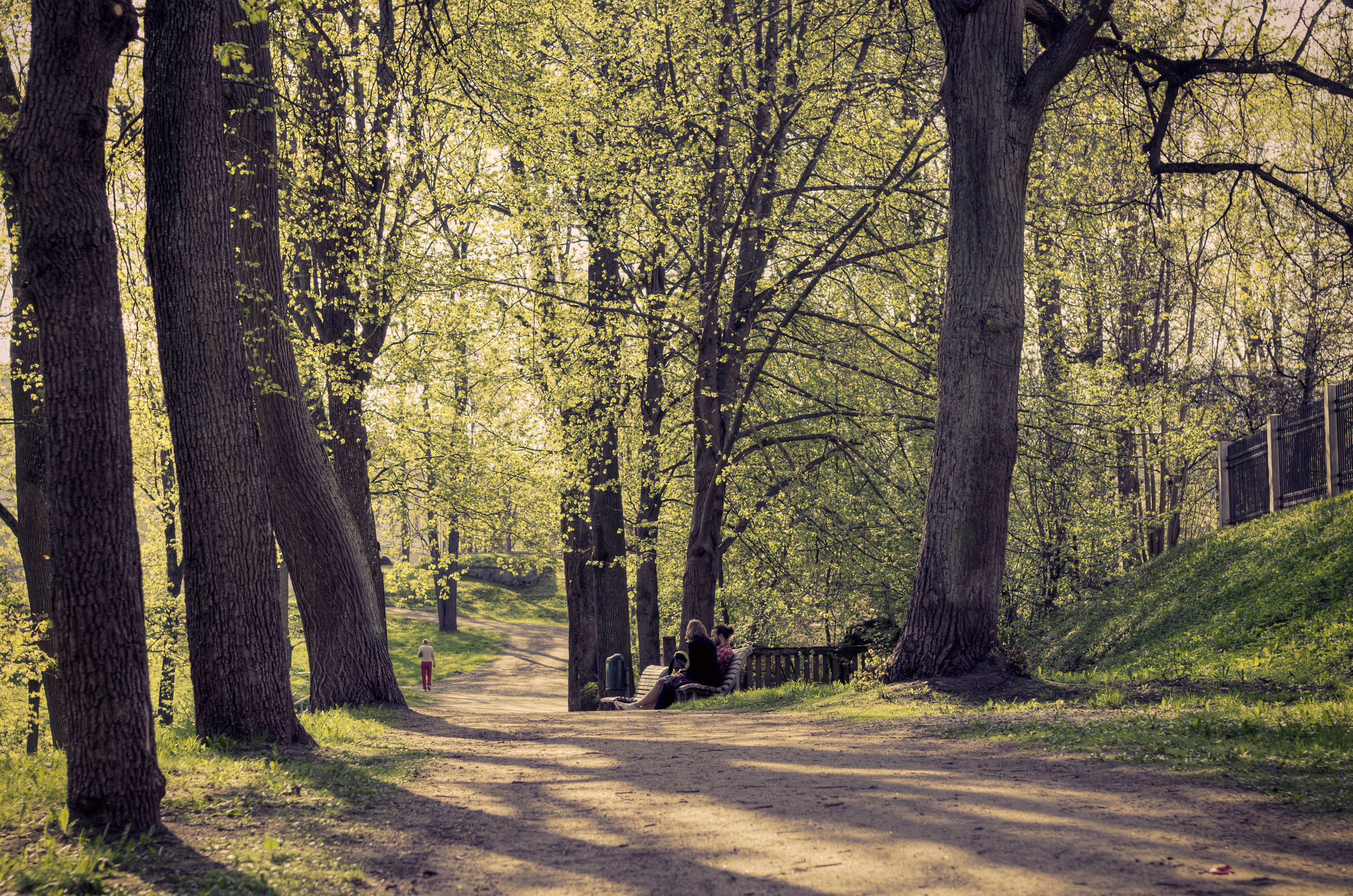 Toomemäe Vallikraavi tänava poolne allee kevadel 2013